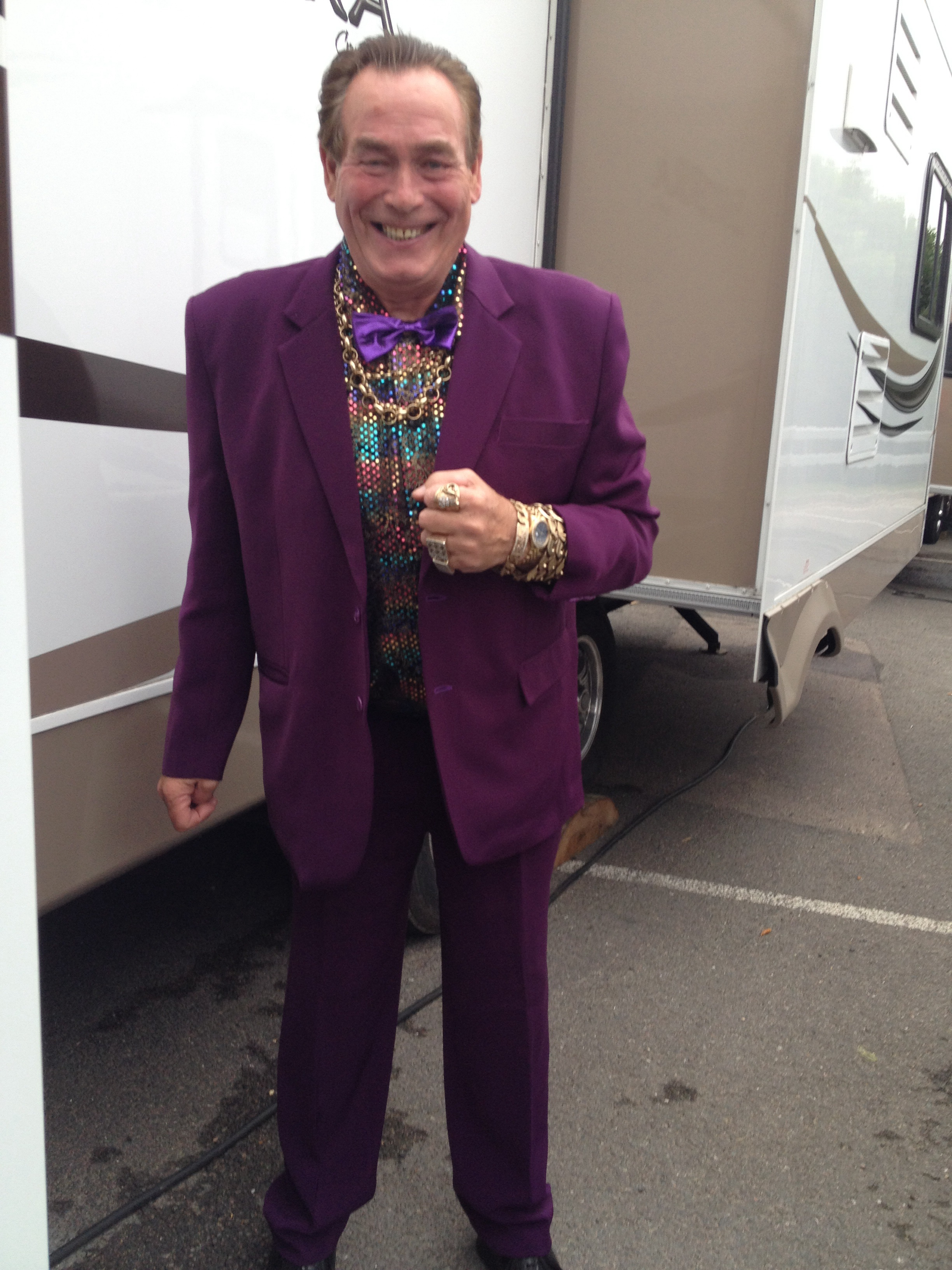 On film set